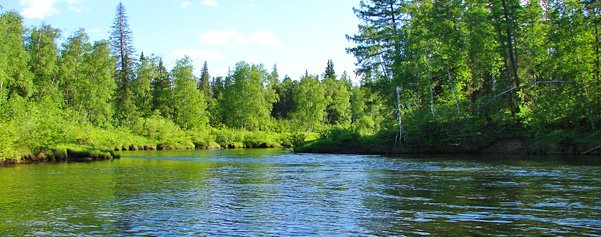 Верхне-Тазовский заповедник: Заповедник располагается в юго-восточной части Ямало-Ненецкого автономного округа в Красноселькупском районе. Он простирается с юга на север на 150 км (от 62°10’ до 63°33’ с.ш.) и с запада на восток на 70 км (от 83° до 85°23’),Красноселькупский район, This image is related to the protected area of Russia number 8900002